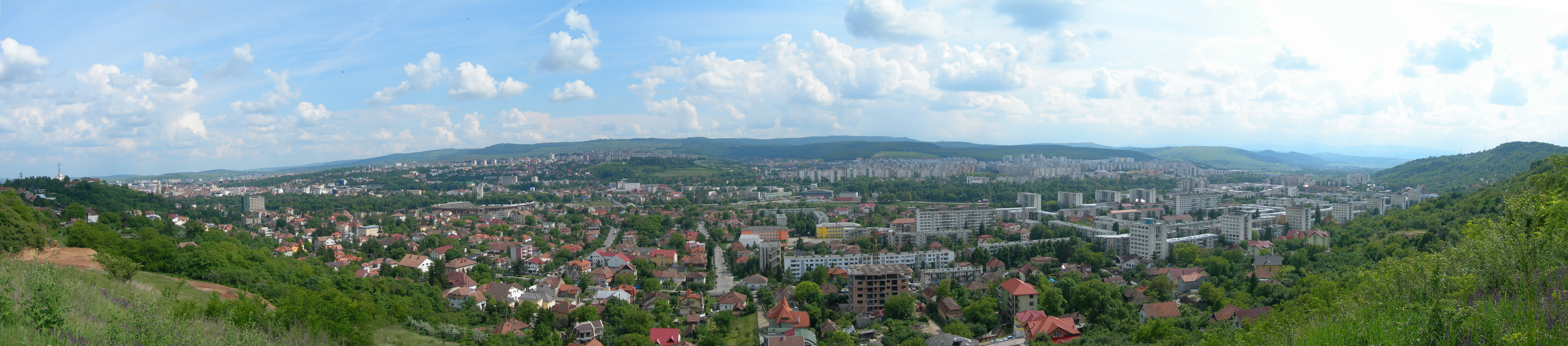 Panorama Cluj din 5 cadre de undeva de langa Taietura Turcului